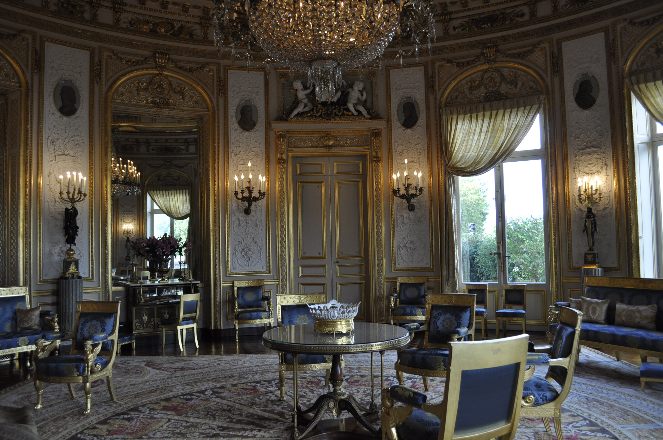 Salon de la rotonde, à l'hôtel de Salm, au VIIeme arrondissement de Paris. Photo prise lors des journées européennes du patrimoine de 2014.